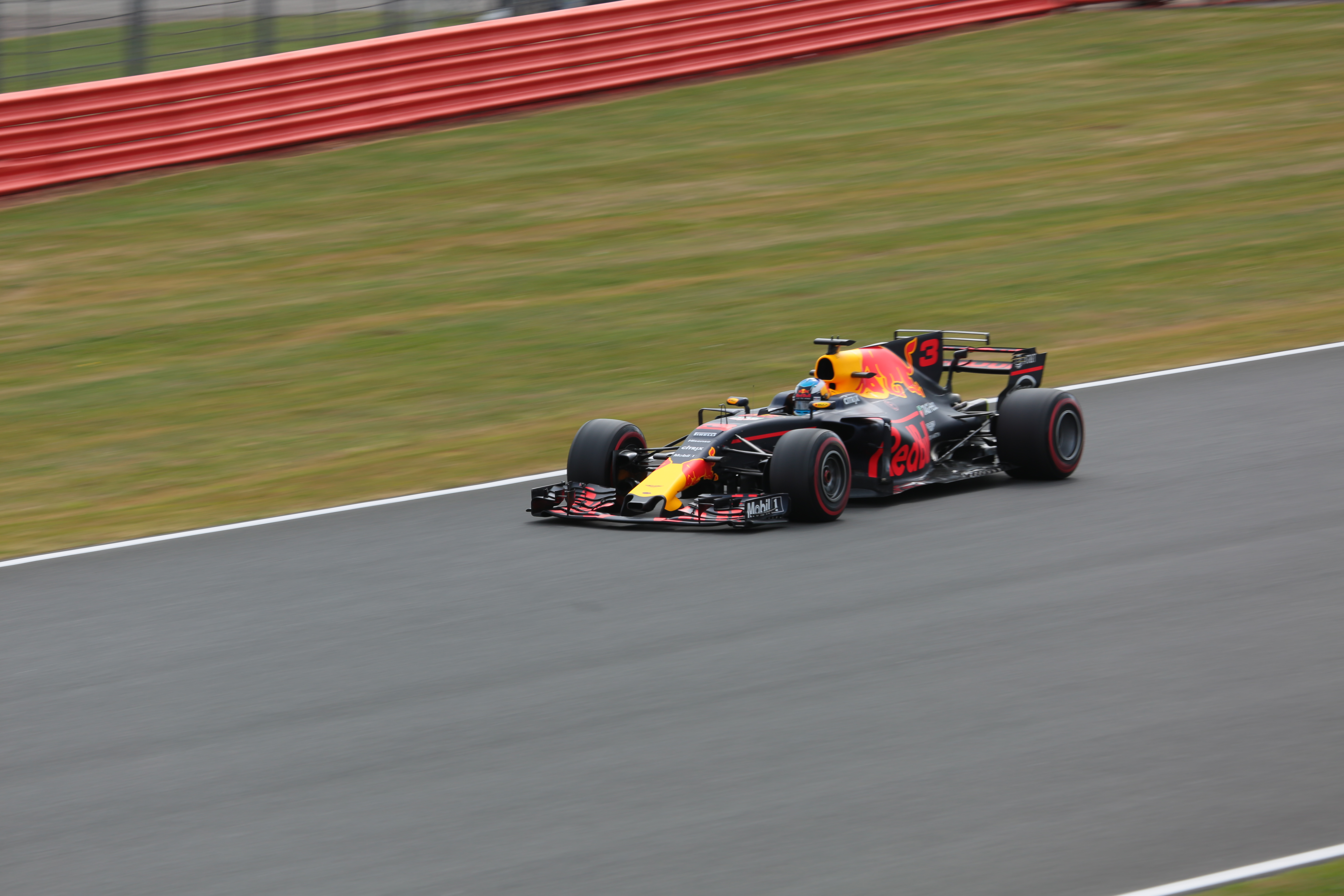 f1